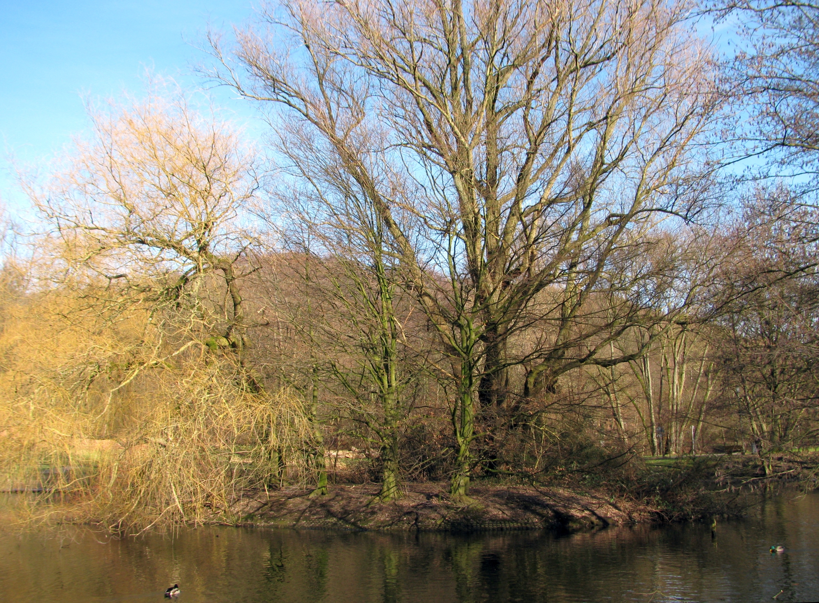 Kaiseraueteich in Bochum